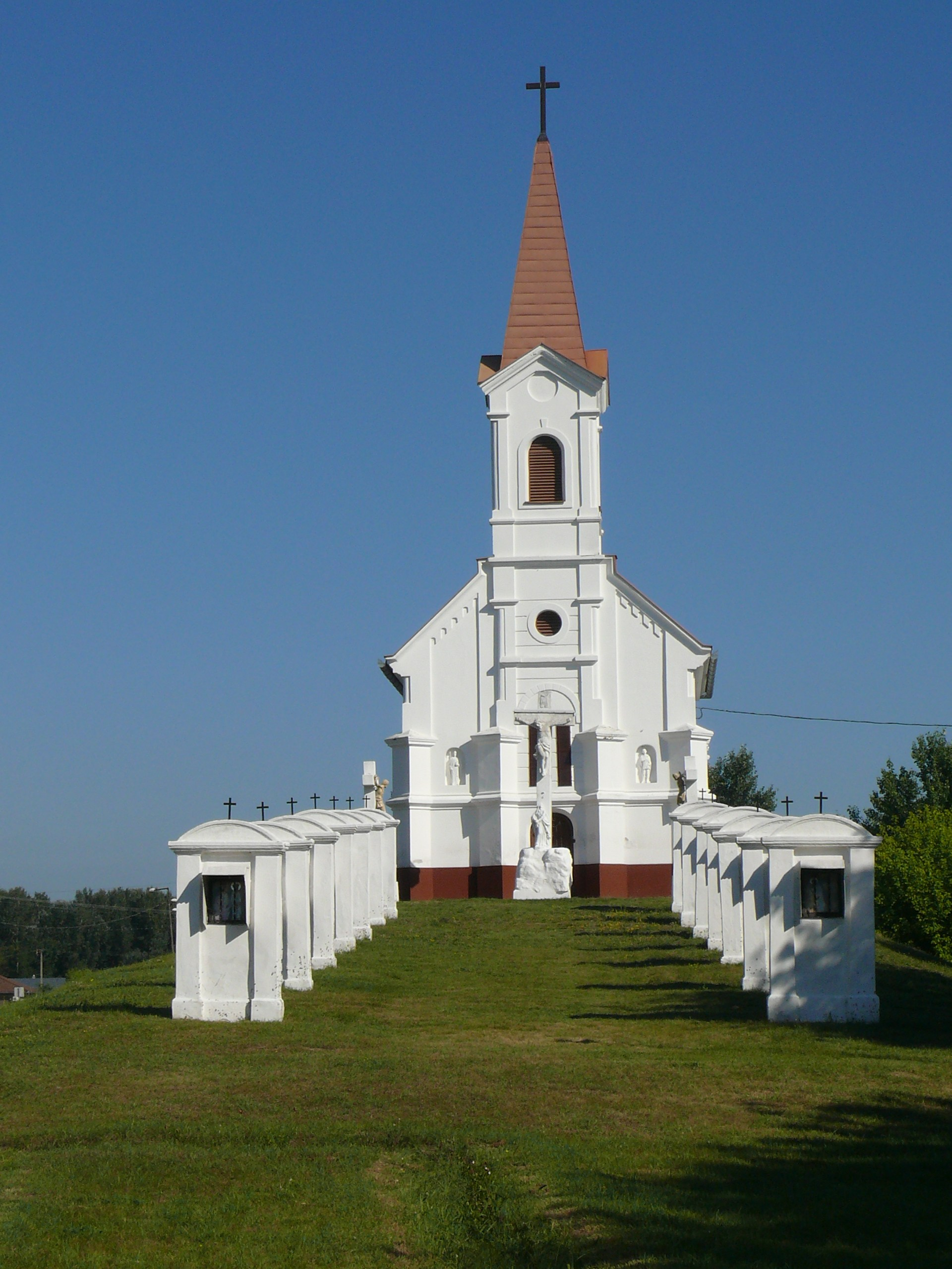 A vaskúti Kálvária kápolna a feszülettel és két latorral, 14 stációval